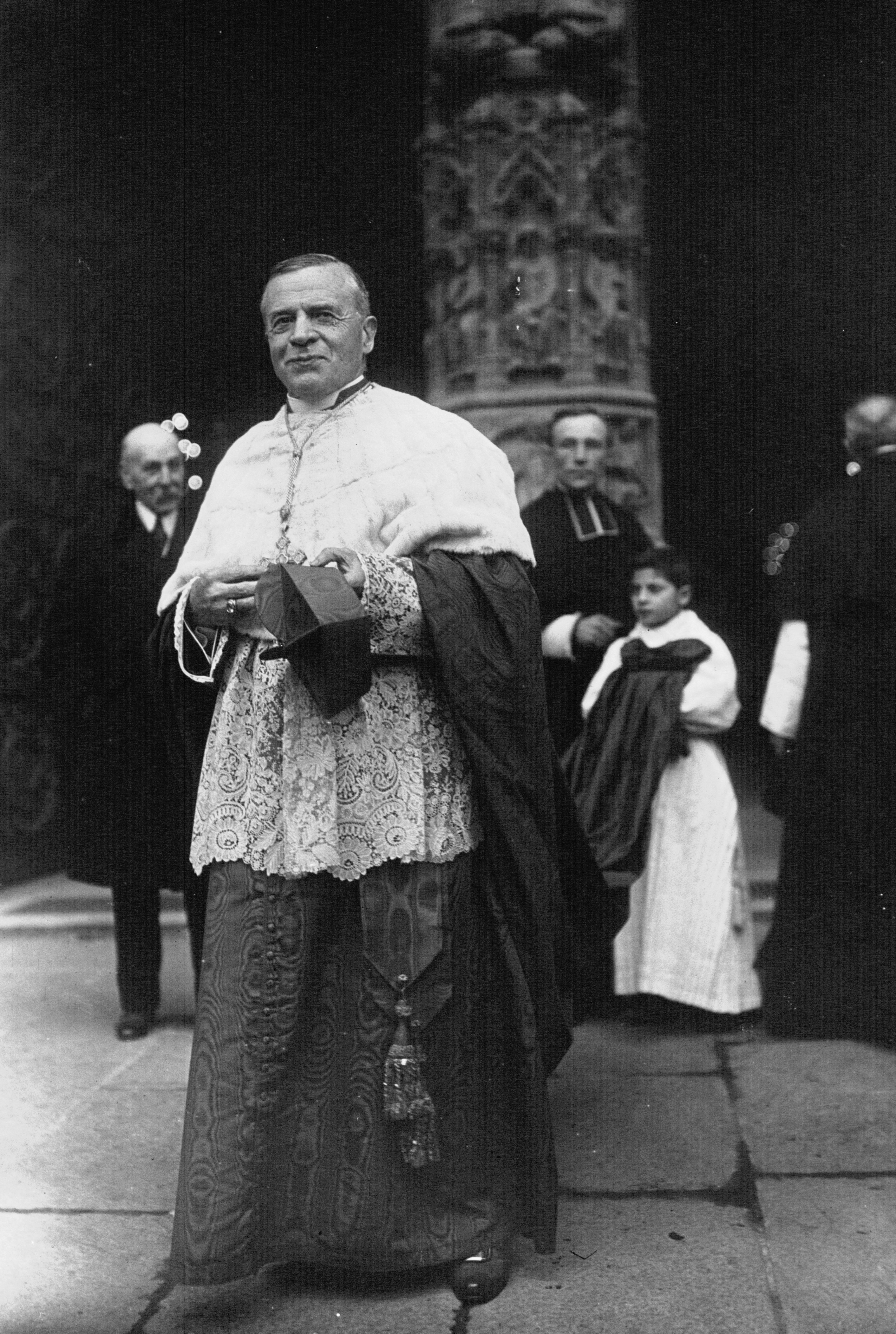 Le nouvel archevêque de Paris, Mgr Dubois, devant Notre-Dame (photographie de presse)